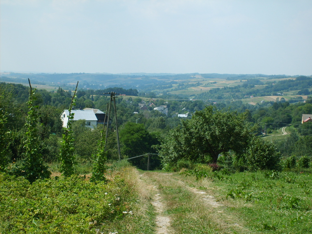 Panorama wsi Dylągówka